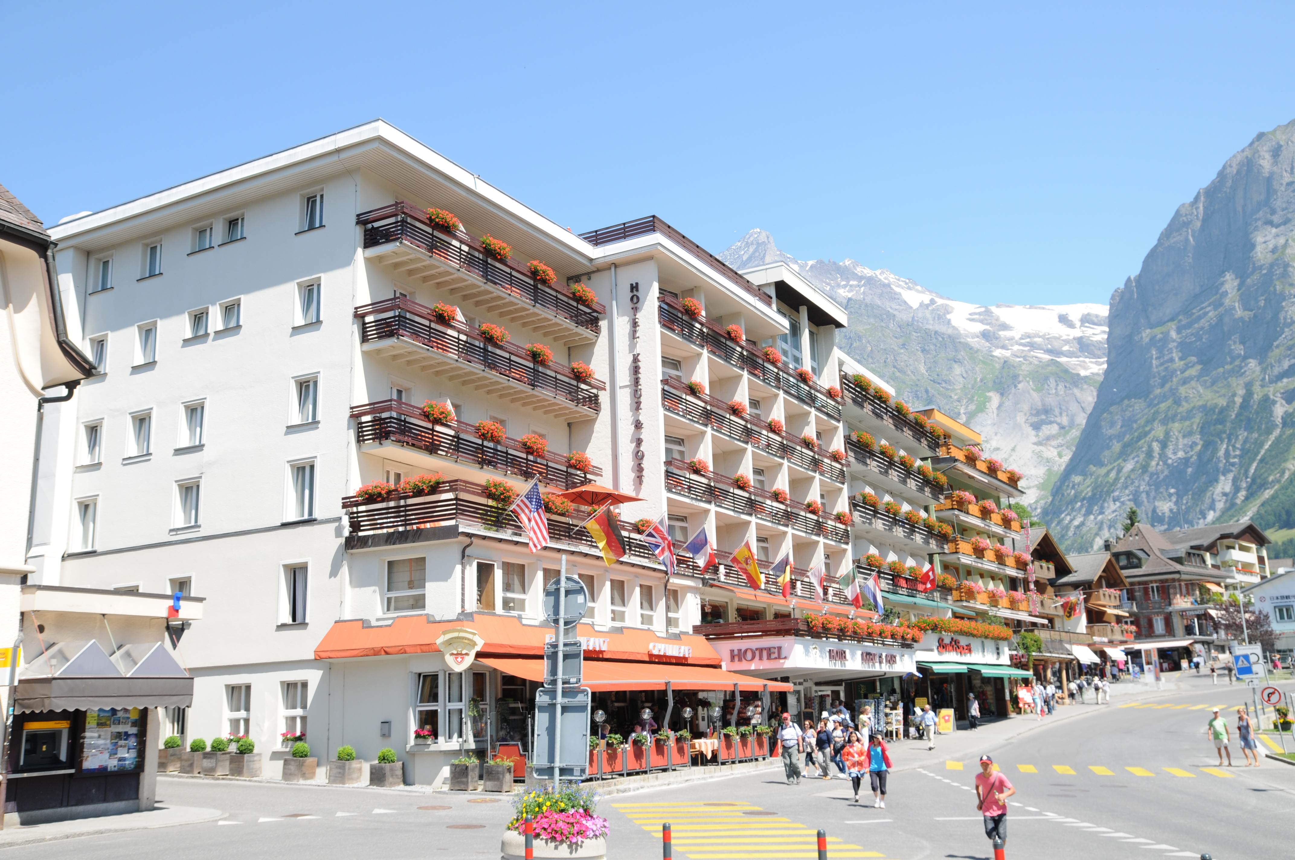 Berner Oberland.